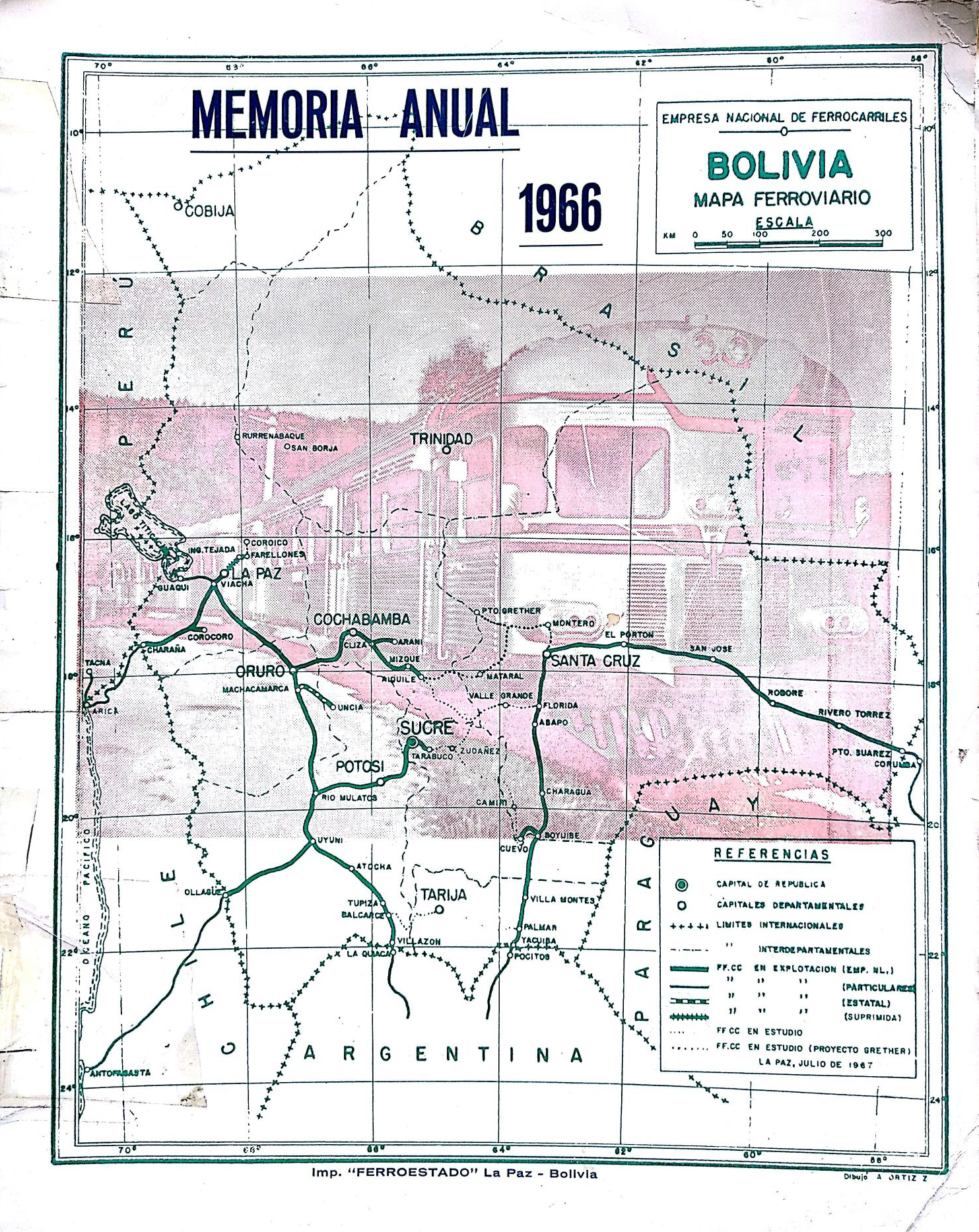 Fotografía de la portada de la segunda memoria de la Empresa Nacional de Ferrocarriles (ENFE) de Bolivia